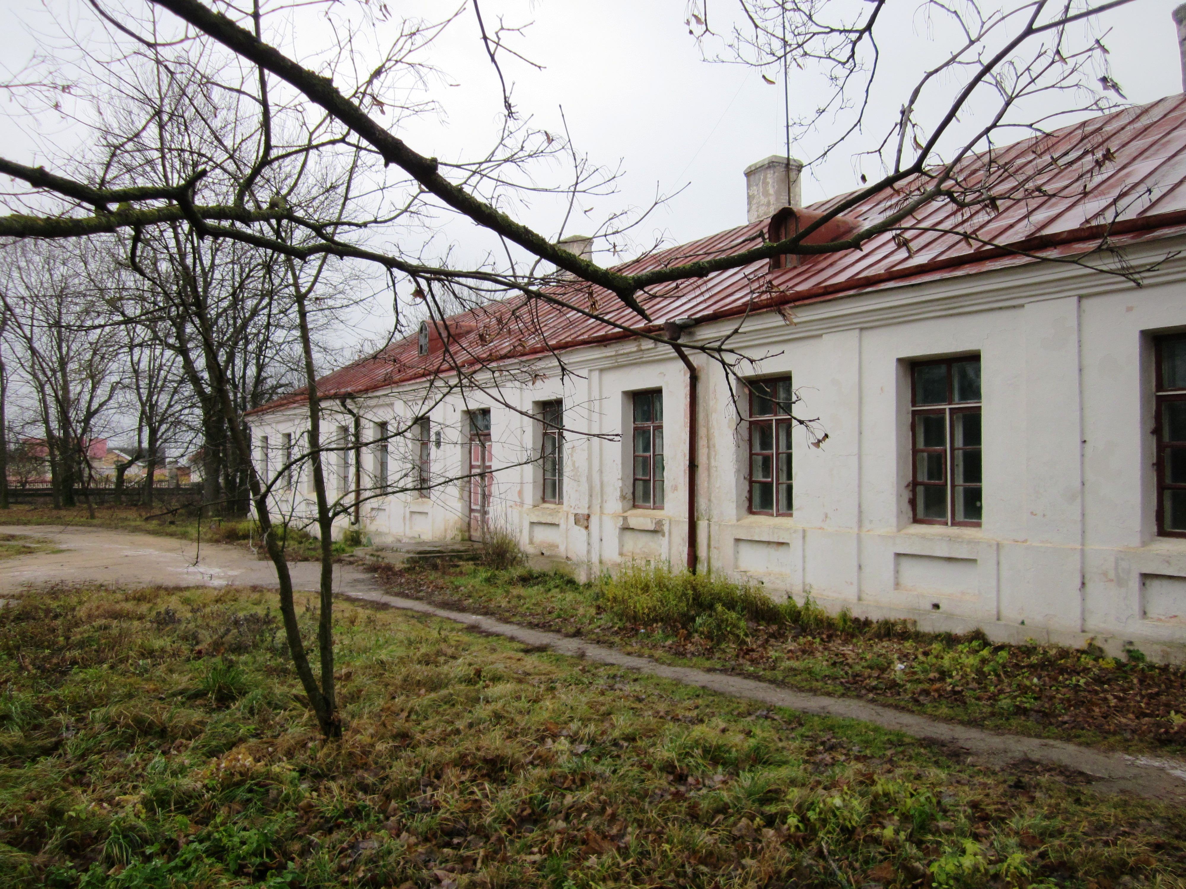 Беларуская (тарашкевіца): Фрагмэнты ансамбля былога палаца Храптовічаў:флігельвяндлярняпаркбібліятэка. в. Шчорсы This is a photo of Belarusian heritage monument. Reference number: 412Г000467 ( WLM)